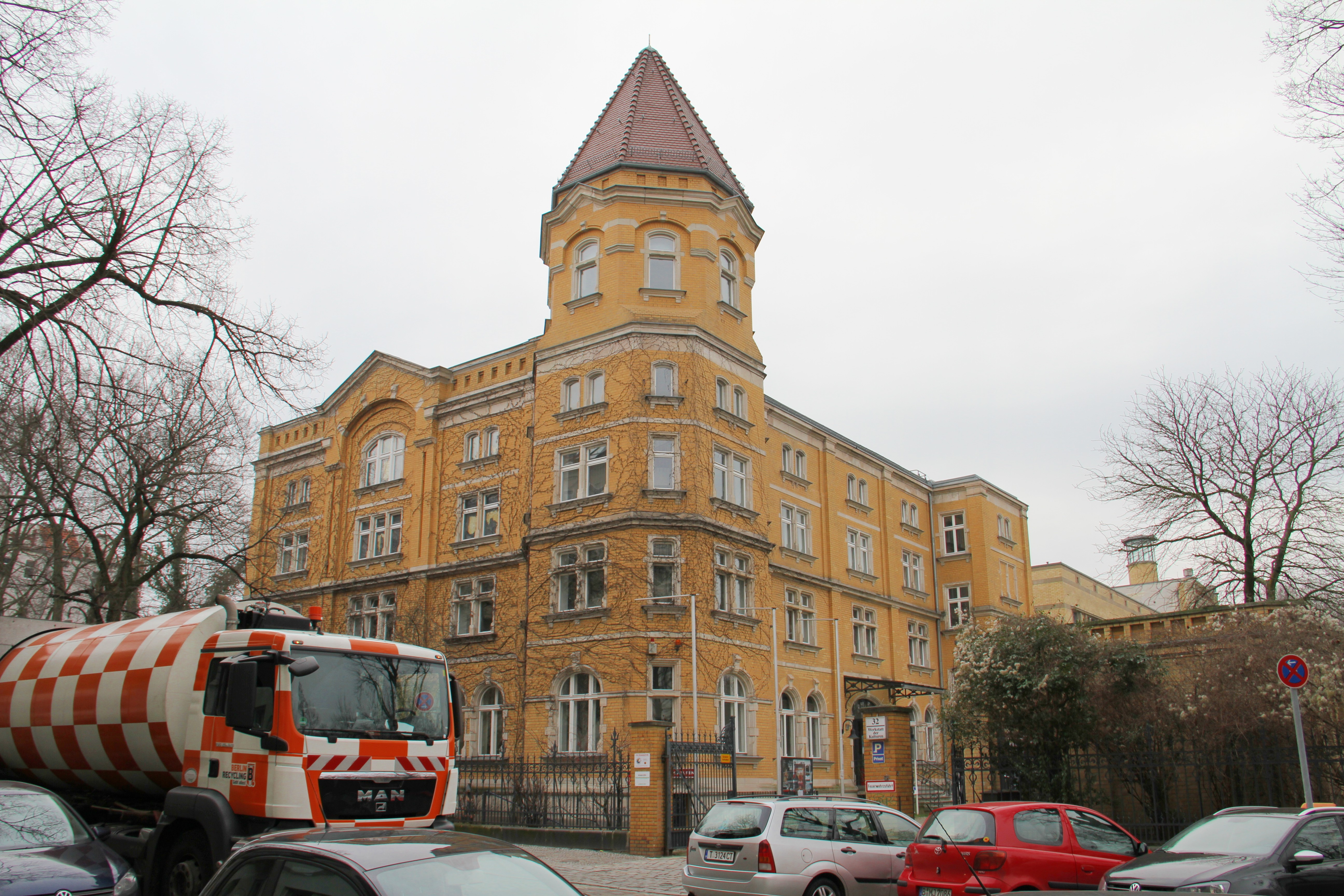 Gebäude der ehem. Bergschloß-Brauerei in Berlin-Neukölln, Wissmannstraße 31/32; Brauereianlage erbaut zwischen ca. 1850 und 1902; technische Einrichtung (und vielleicht auch architektonische Gestaltung) vom Ingenieurbüro Hanner & Hering in Leipzig; heute "Werkstatt der Kulturen"